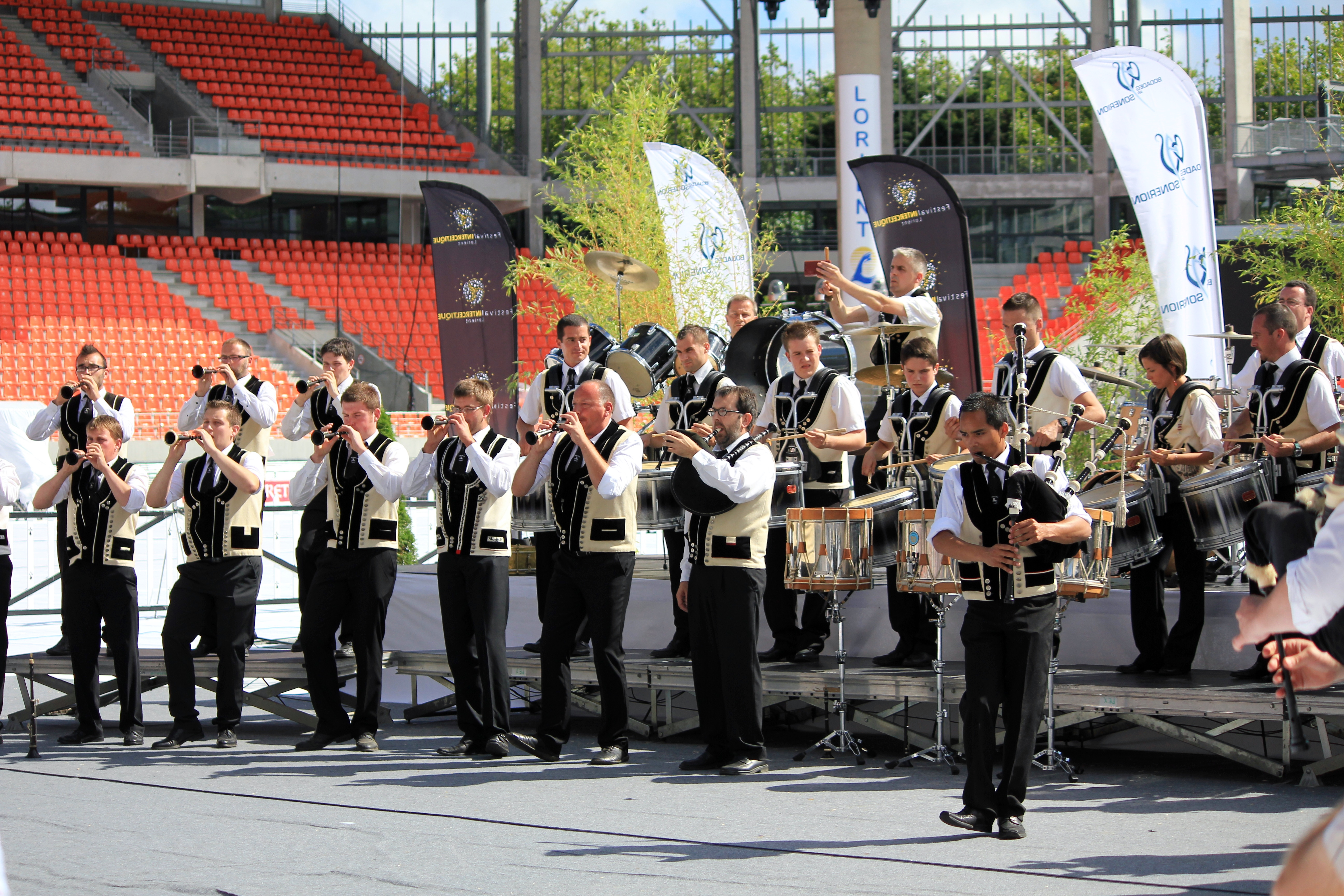 La Kerlenn Pondi lors de l'épreuve de Lorient du championnat national des bagadoù organisée dans le cadre du festival interceltique de Lorient 2013.